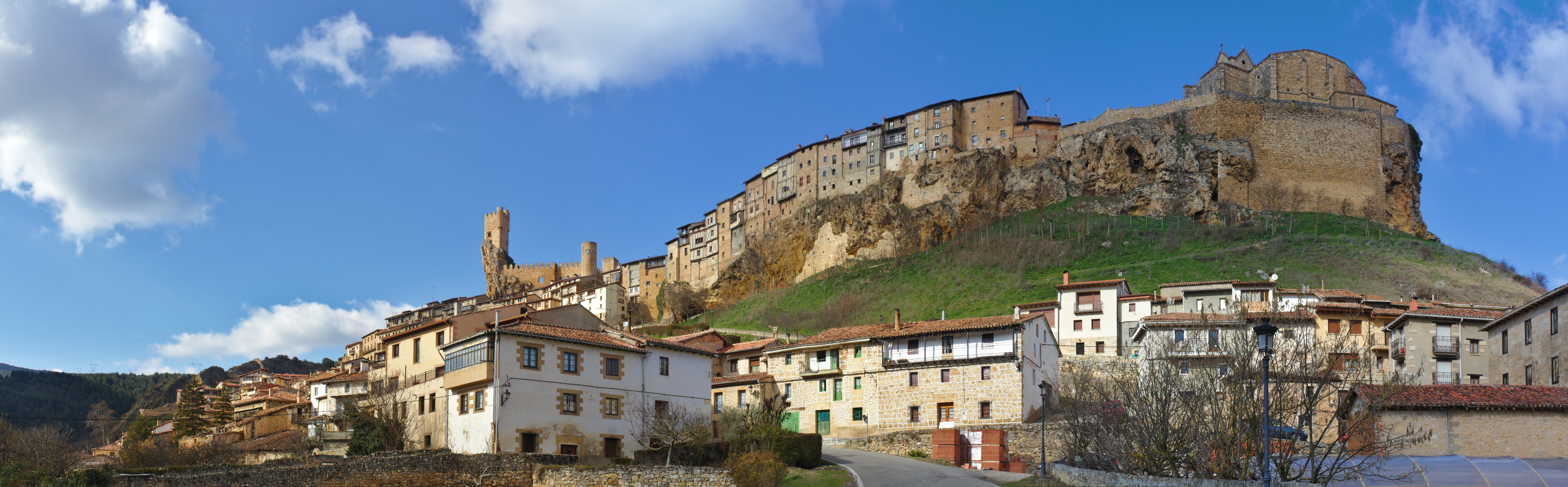 Panorámica de Frías (Burgos, España), desde la la carretera BU-520.